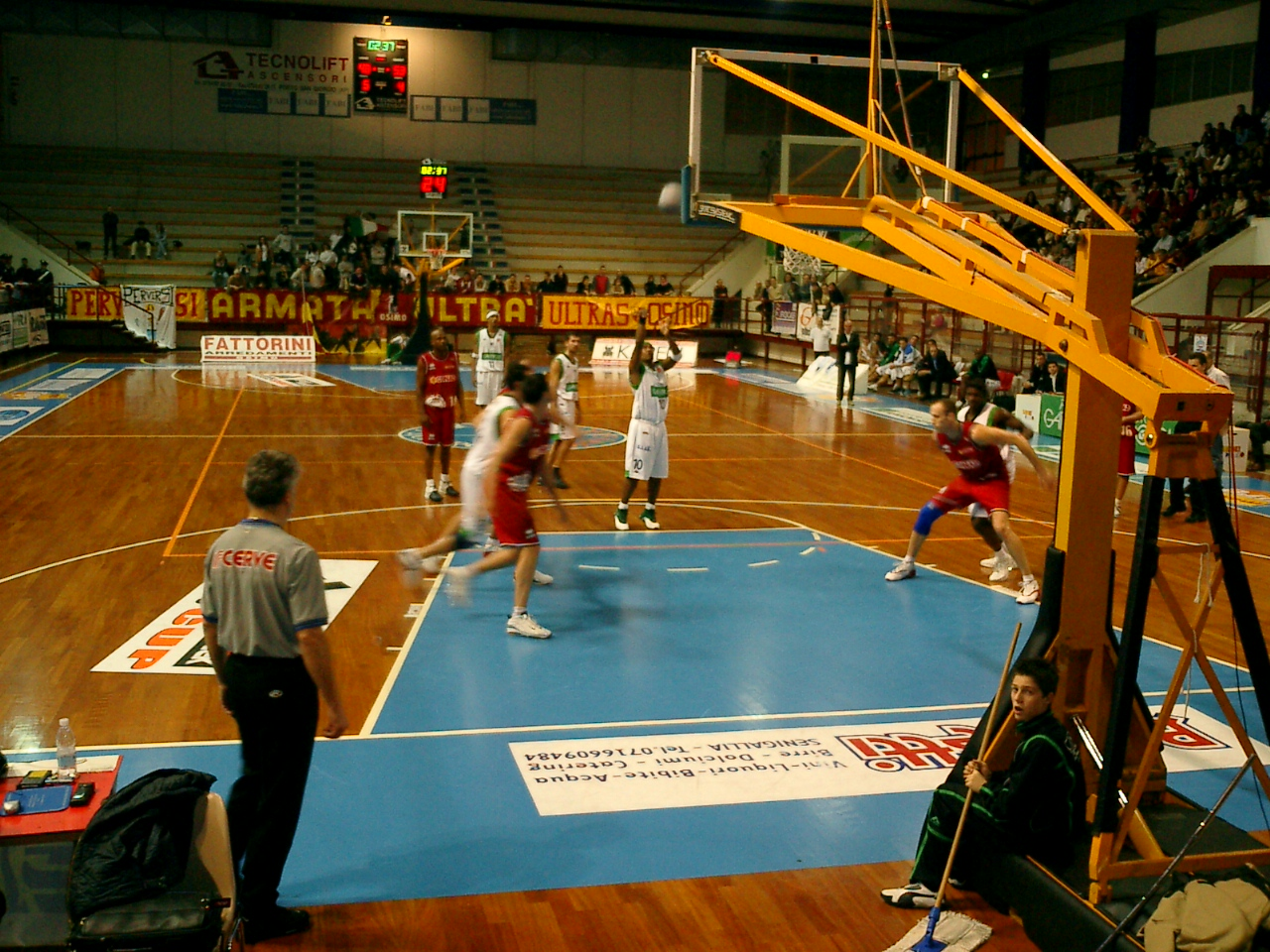 Il Palasport di Porto San Giorgio nel dicembre 2003, quando ospitava le partite interne della Robur Osimo.